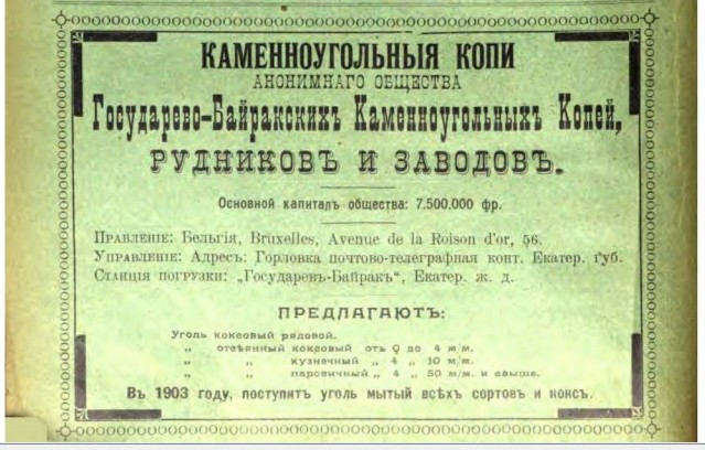 Рекламный листок Акционерного общества Государево-Байракских каменноугольных копей, рудников и заводов. Российская империя, 1903 г.